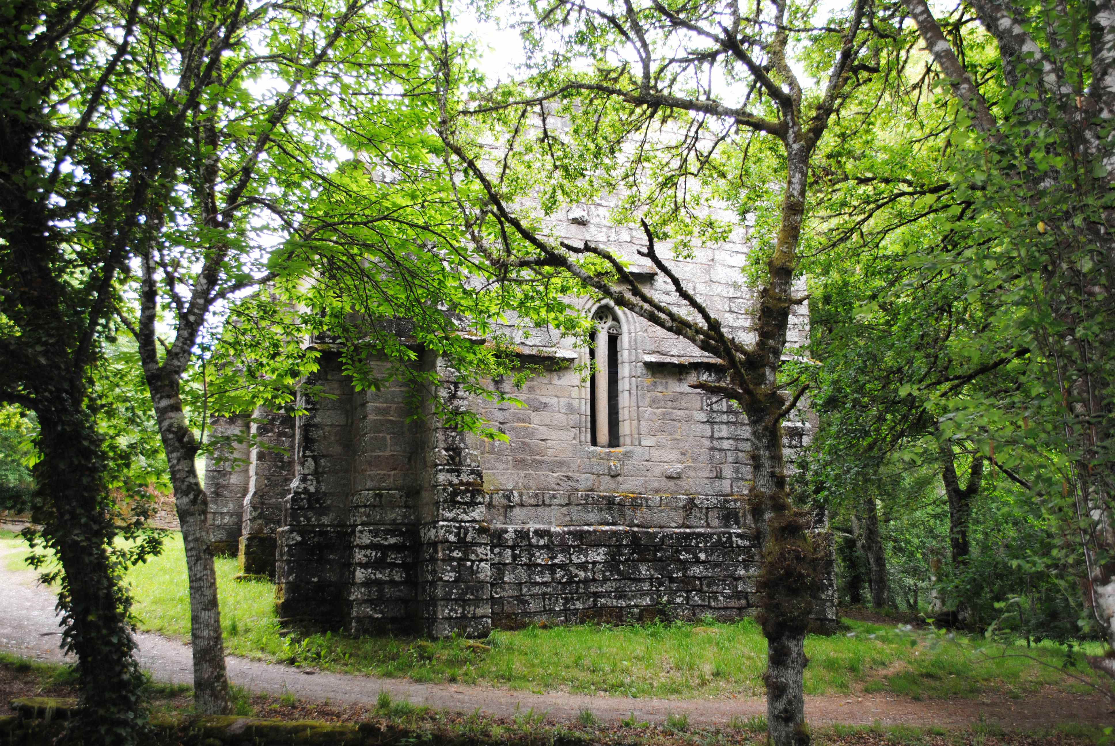 Vexa o título e as categorías.